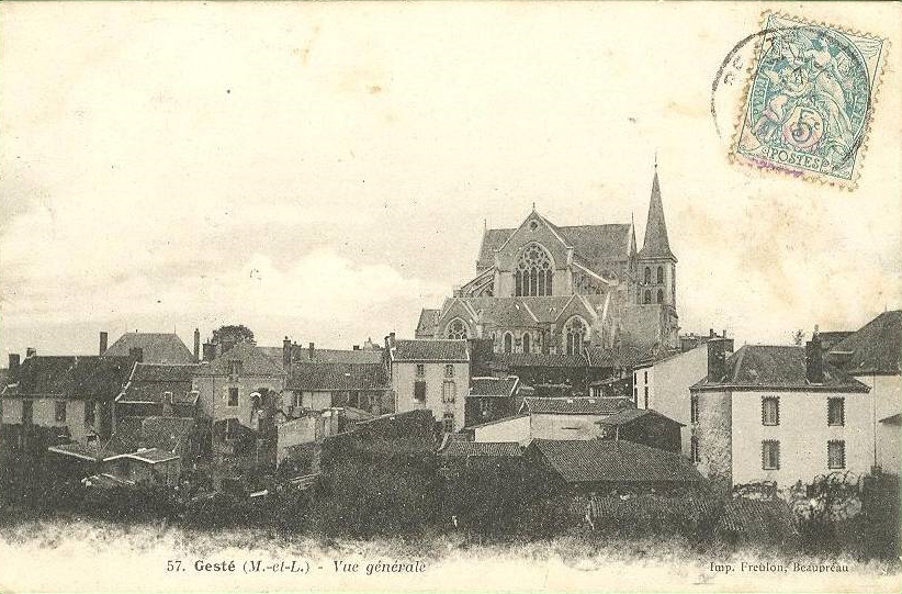 CPA ancienne du village de Gesté